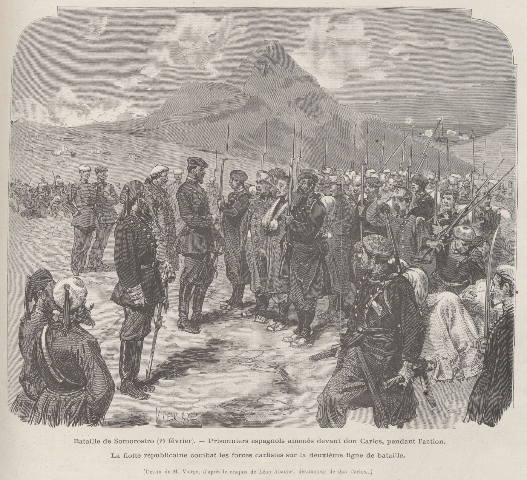 Bataille de Somorostro (25 février). - Prisonniers espagnols amenés devant don Carlos, pendant l'action. La flotte républicaine combat les forces carlistes sur la deuxiéme ligne de bataille (Dessin de M. Vierge, d'après le croquis de Léon Abadias, dessinateur de don Carlos..), dibujo de Vierge, en la revista Le Monde Illustré.